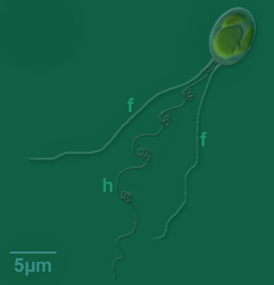 Exemple de forme (h : ci en partie enroulée de manière hélicoïdale) d'haptonème chez une algue de la classe des Haptophyta, entre deux flagelles (f). D'autres tailles et formes d'haptonèmes sont trouvés chez les algues de cette classe. Parfois l'haptonème est vestigial ou inexistant. Il semble jouer plusieurs fonctions pour l'alimentation et la survie de ces microalques unicellulaires. Il est utilisé pour la classification de ces espèces. Chez certaines espèces, il n'apparait que sous certaines phases de développement (phase motile).